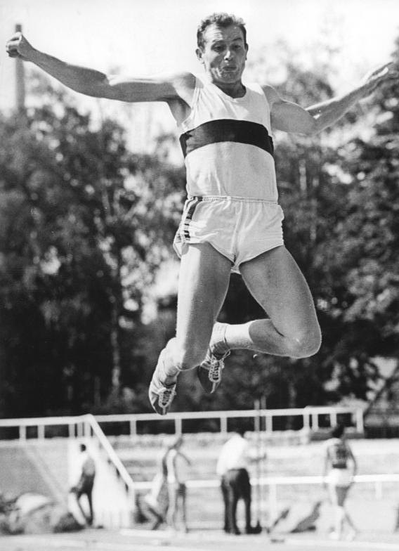 Wolfgang Utech Zentralbild Liebers 21.7.1964 Jena: Bei den Deutschen Zehnkampf-Meisterschaften am 19.7.1964 in Jena verteidigte Wolfgang Utech (SC Chemie Halle) mit 7090 seinen Titel erfolgreich. Er erfüllte damit auch als einziger die Olympianorm.